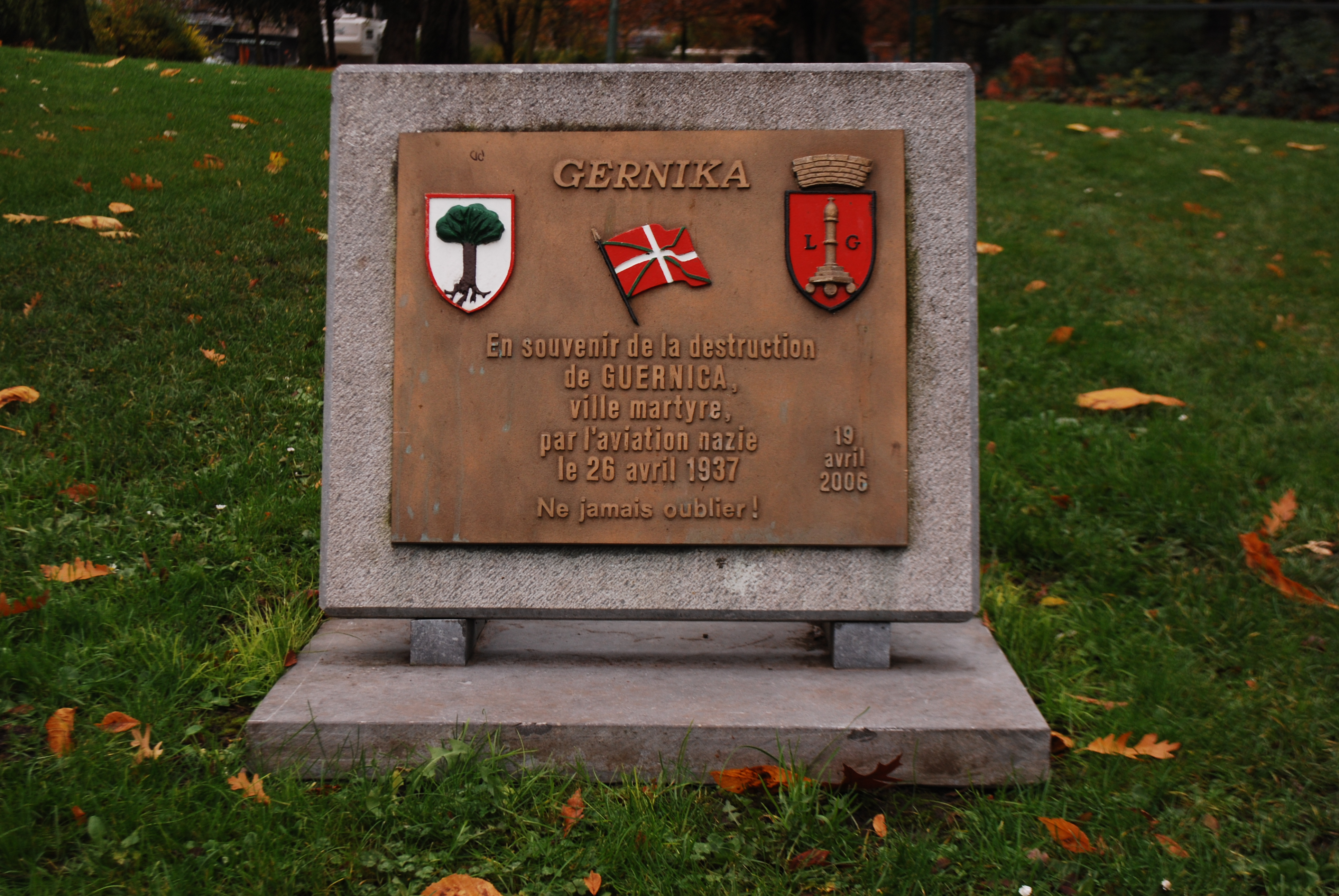 Le parc d'Avroy, à Liège : plaque commémorative du bombardement de Guernica (2006).